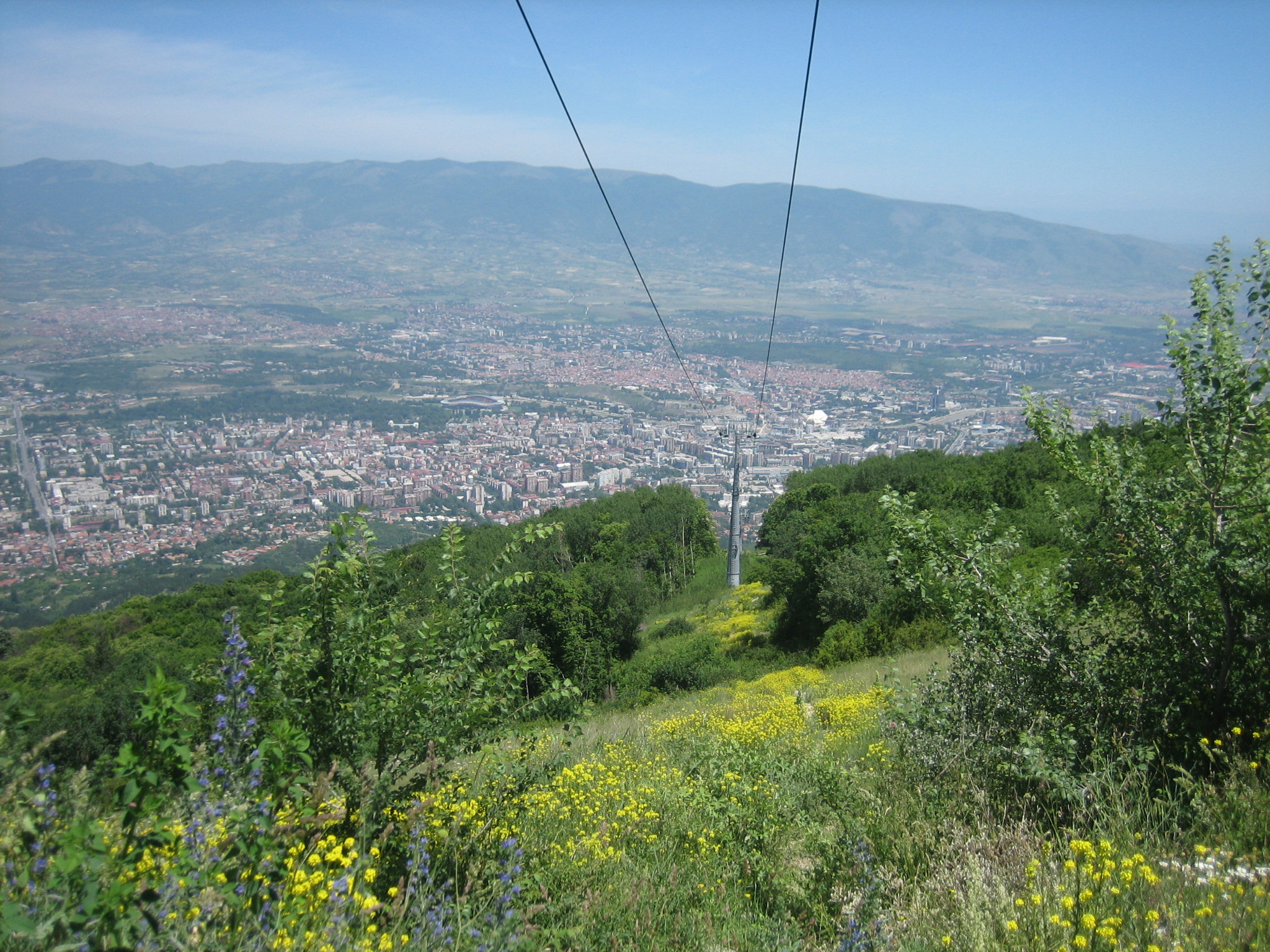 Skopje, Macedonia